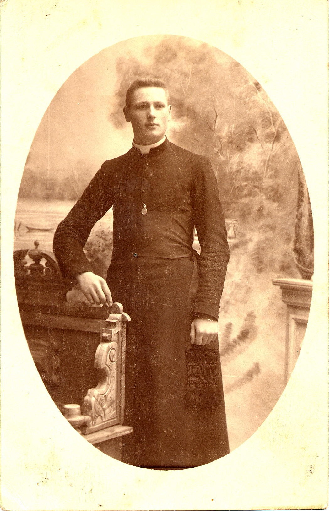 L'abbé Joseph Péters, né le 1er juin 1894 à Verviers (Belgique) et guillotiné le 1er juillet 1943 à la prison de Plötzensee (Allemagne), est un résistant belge de la Seconde Guerre mondiale.